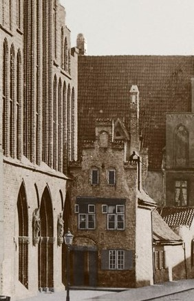 Katharinenkirche und Kustoshaus (vor 1873)